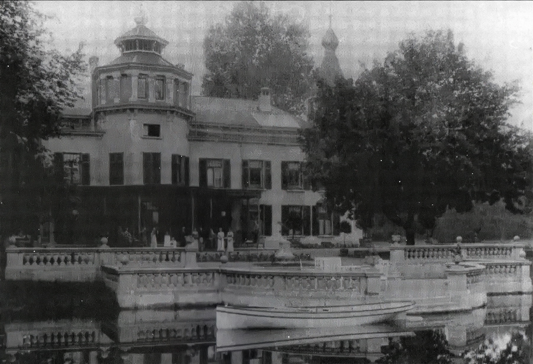 Gezicht vanaf de tuin op Villa Kruisdonk in Meerssen (tegenwoordig Maastricht) omstreeks 1900. Omstreeks deze tijd woonde hier het gezin van Louis II Regout.